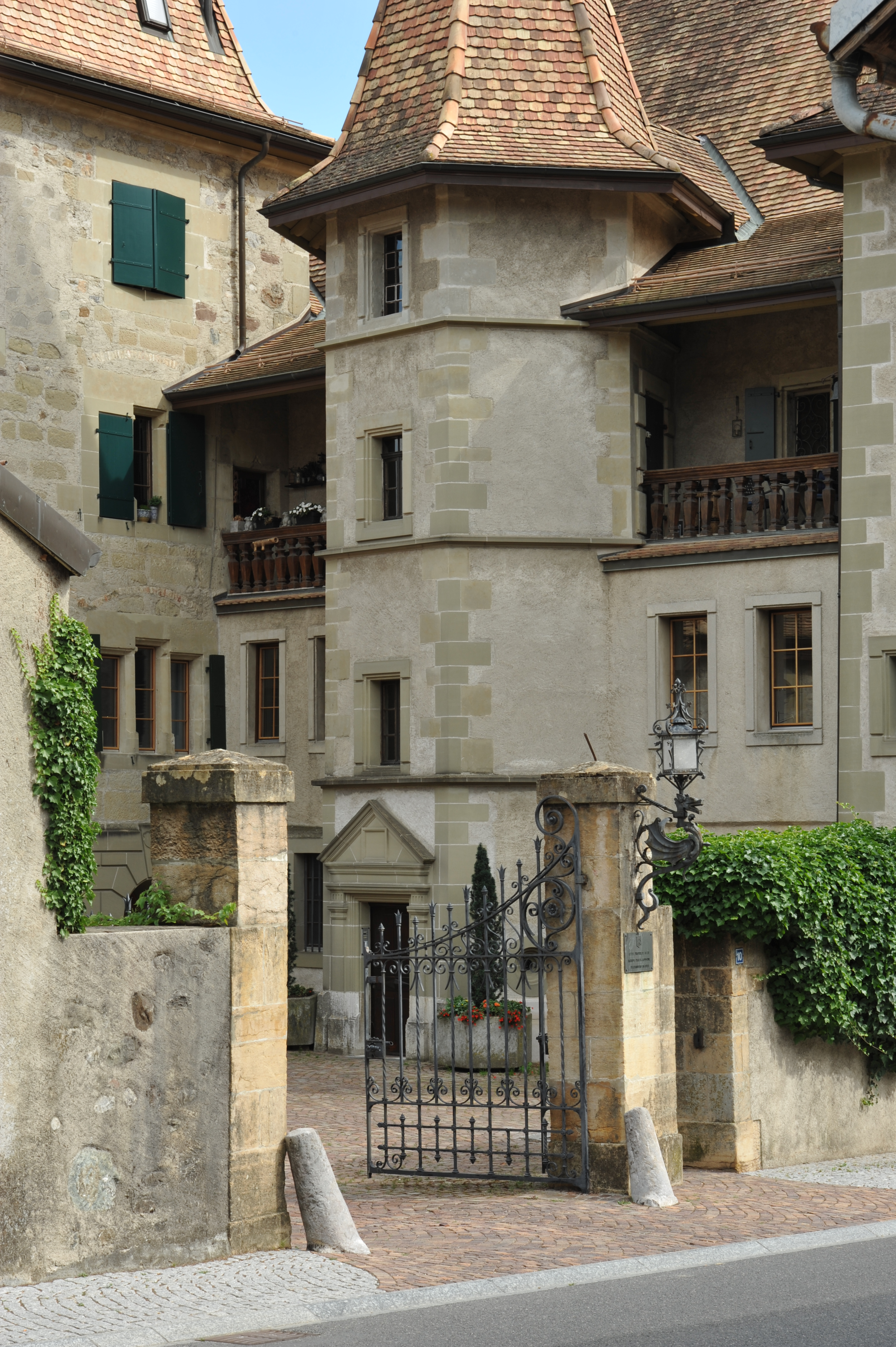 Château d'Echandens - Schloss Echandens - Castle Echandens